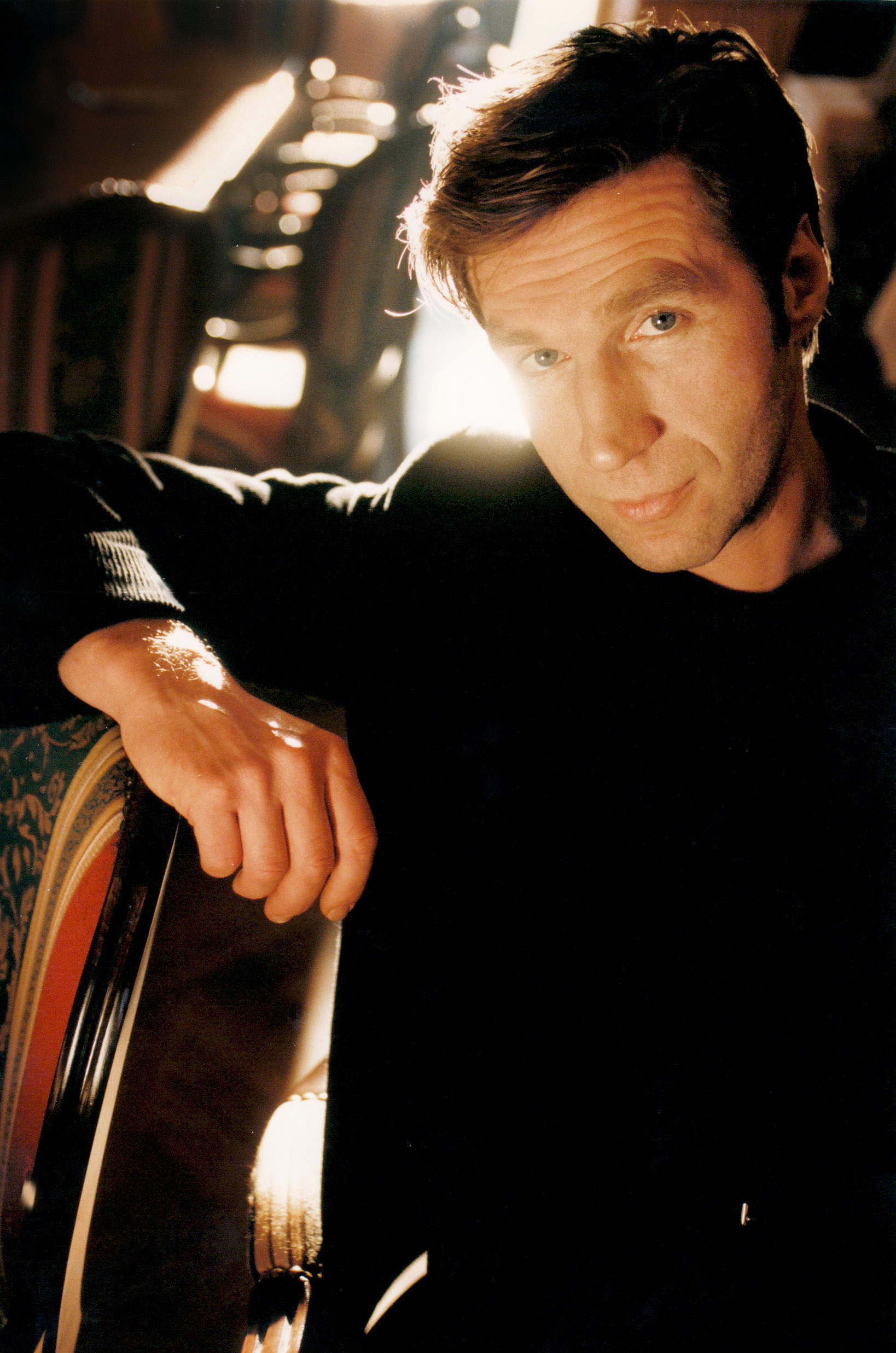 Frank Boeijen, Nederlands zanger en muzikant